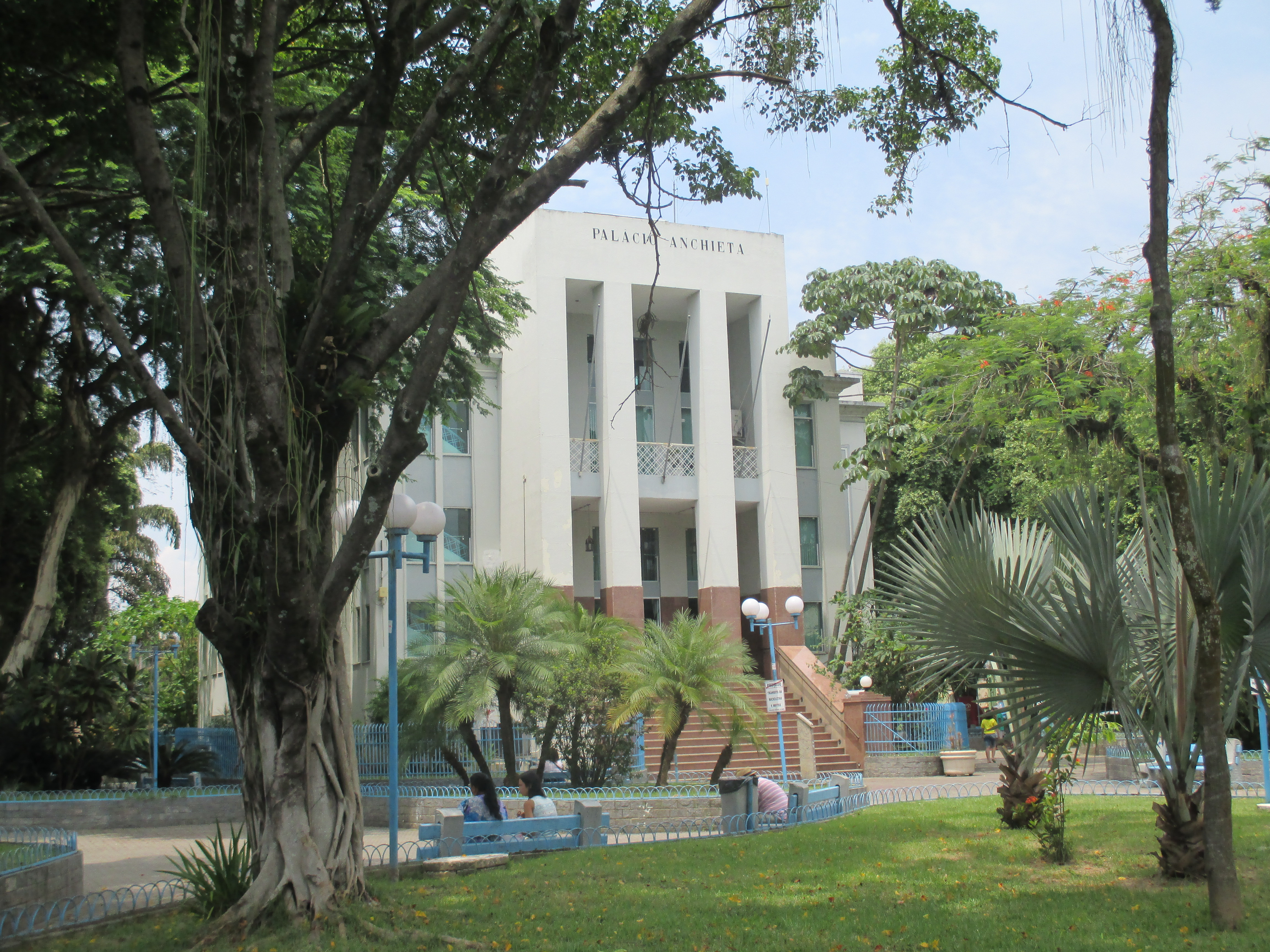 Foto da prefeitura do município de Magé - Rio de Janeiro